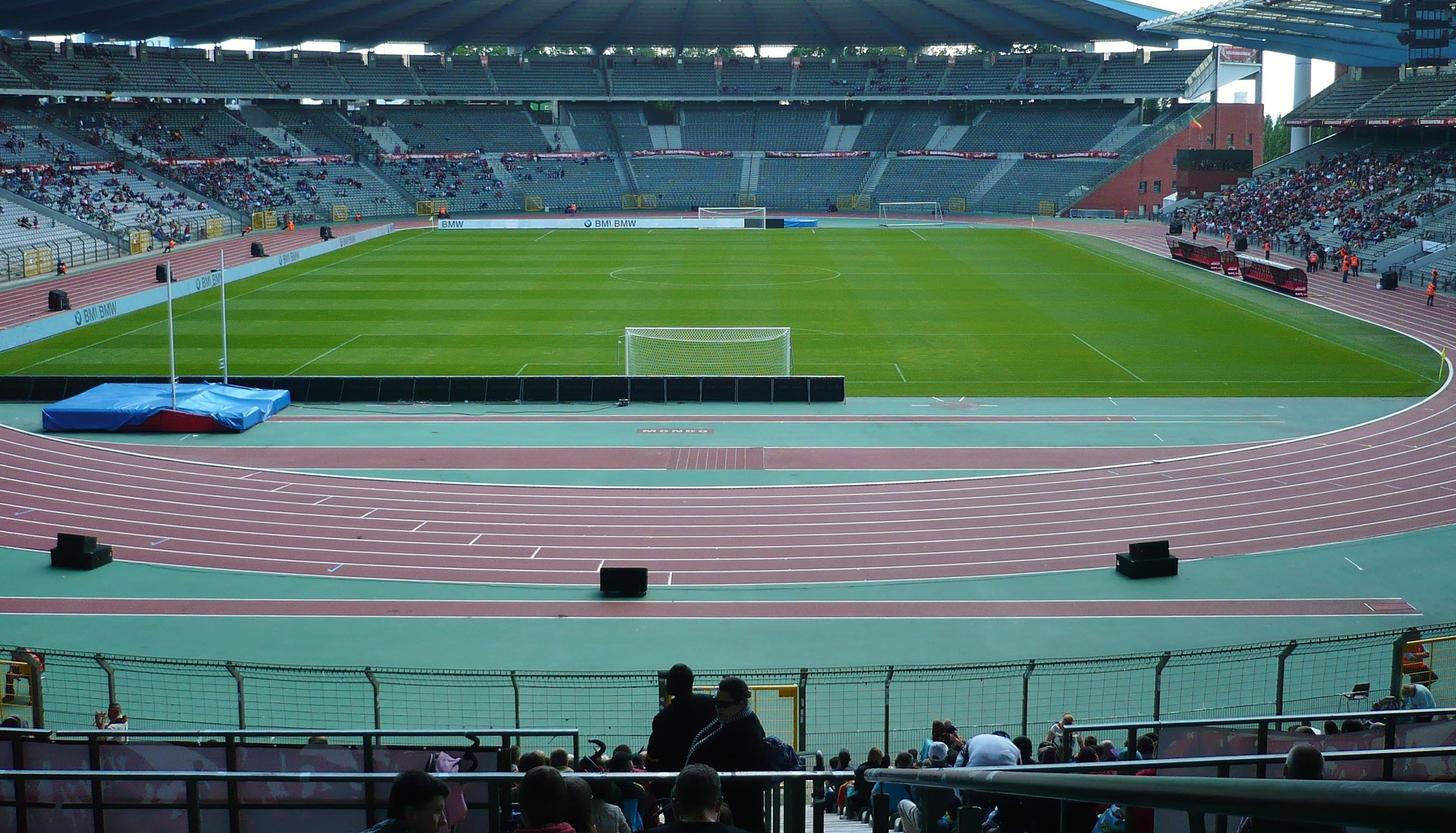 Vue du Stade Roi Baudouin de l'intérieur